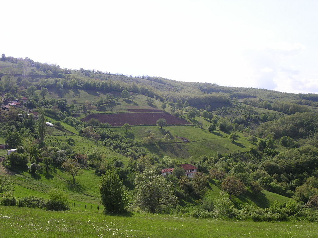 fshati kokaj